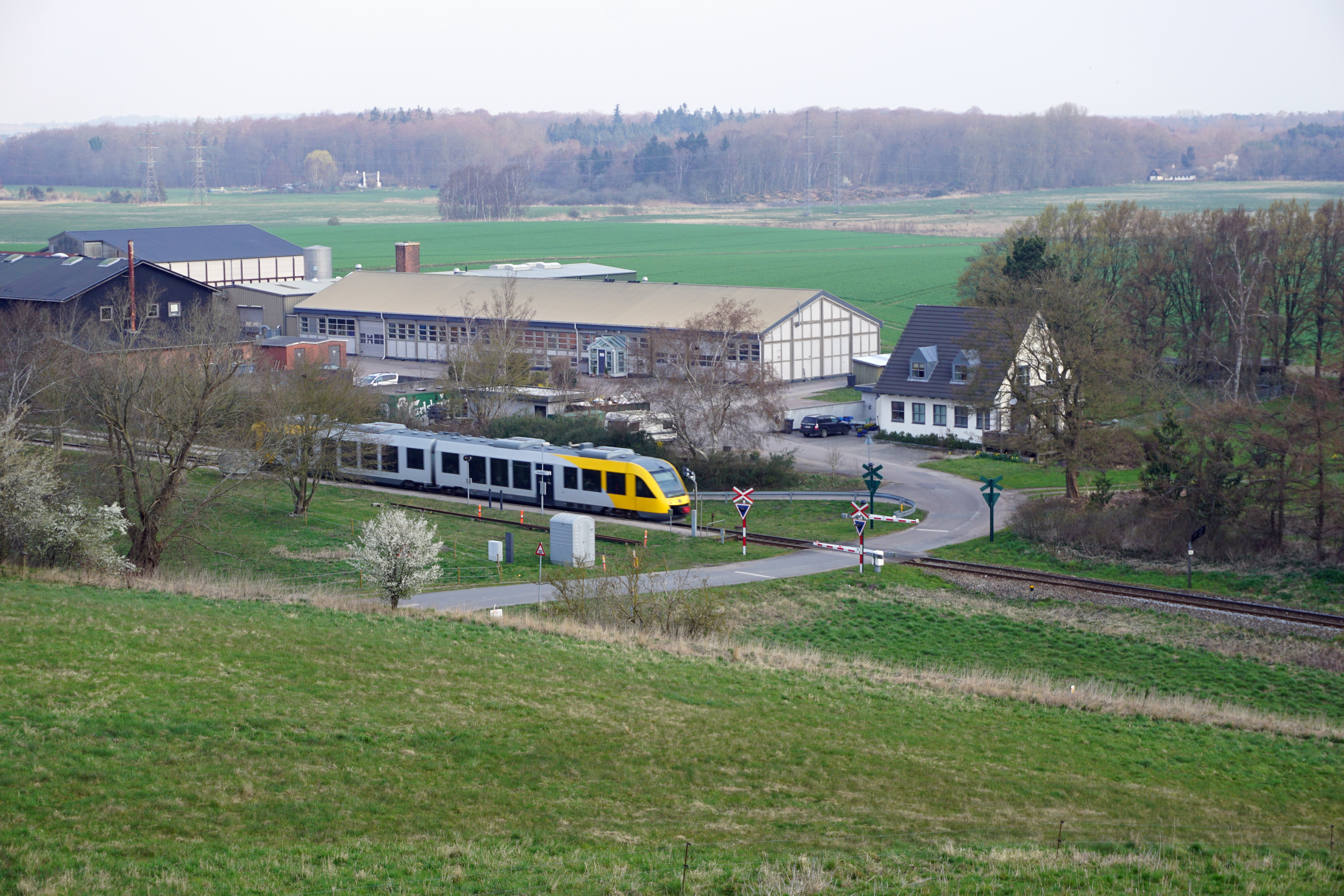 Grimstrup Trinbræt på Frederiksværksbanen. Jernbaneoverskæring med Grimstrupvej. Billede taget den 6. april 2019.